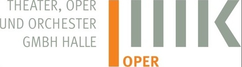 Logo des Opernhauses Halle